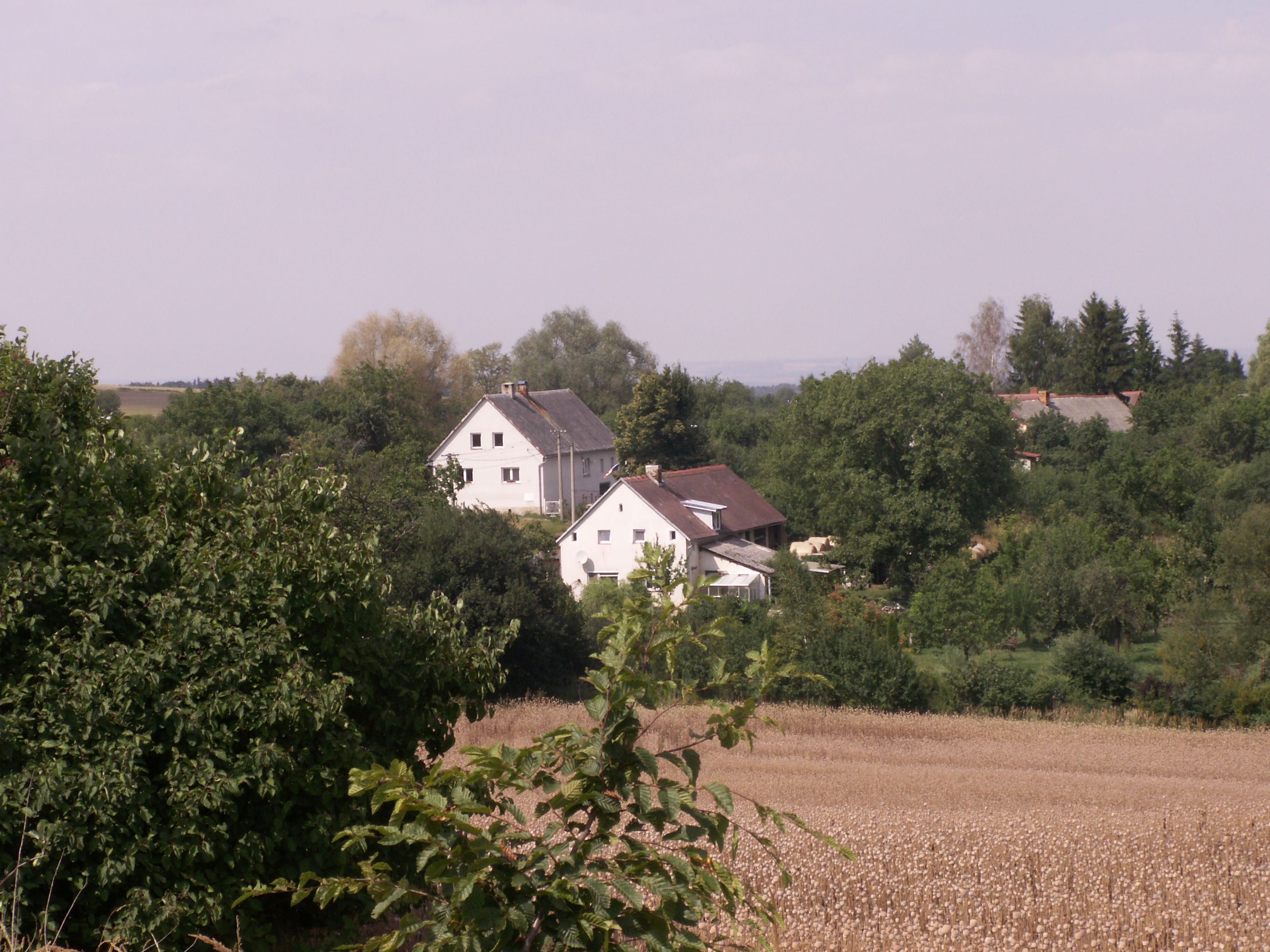 Strachovičky, místní část obce Velké Kunětice, okres Jeseník